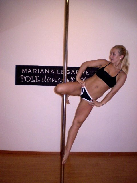 Pole dance na barra vertical